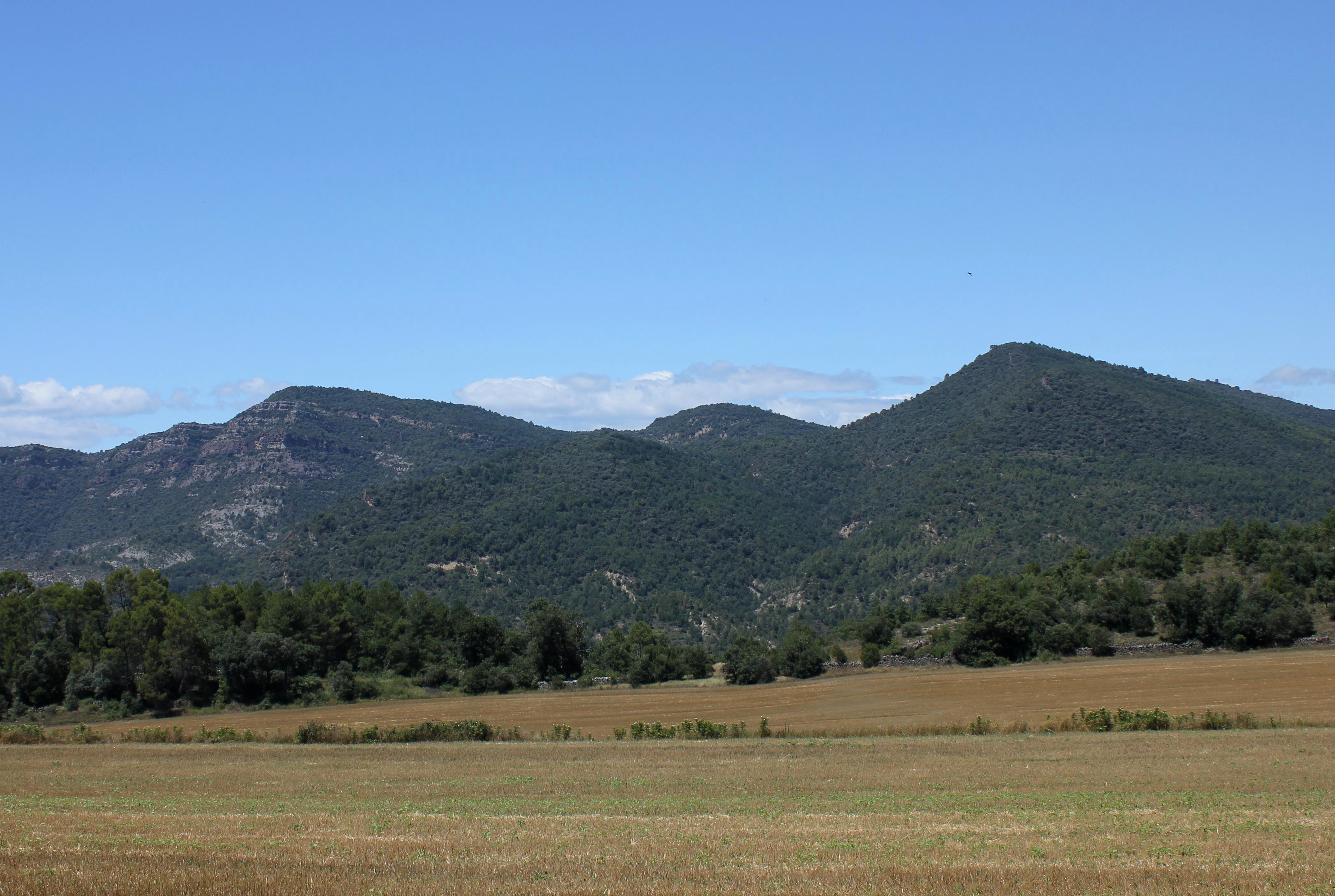 Aragonés: Sierra de Muro de Roda